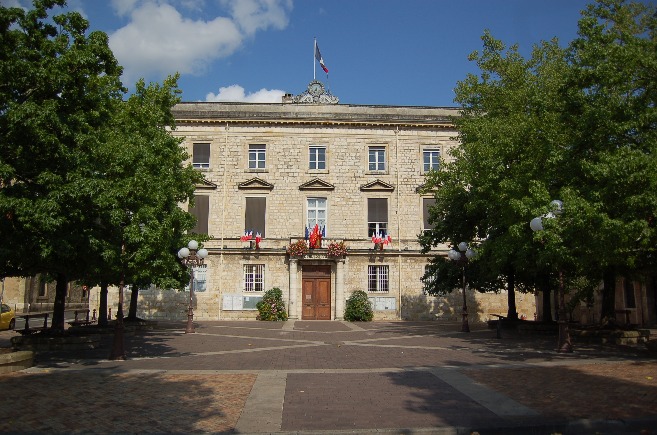 Mairie d'Agen